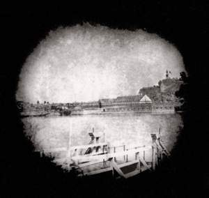 Петроворадин 1850.